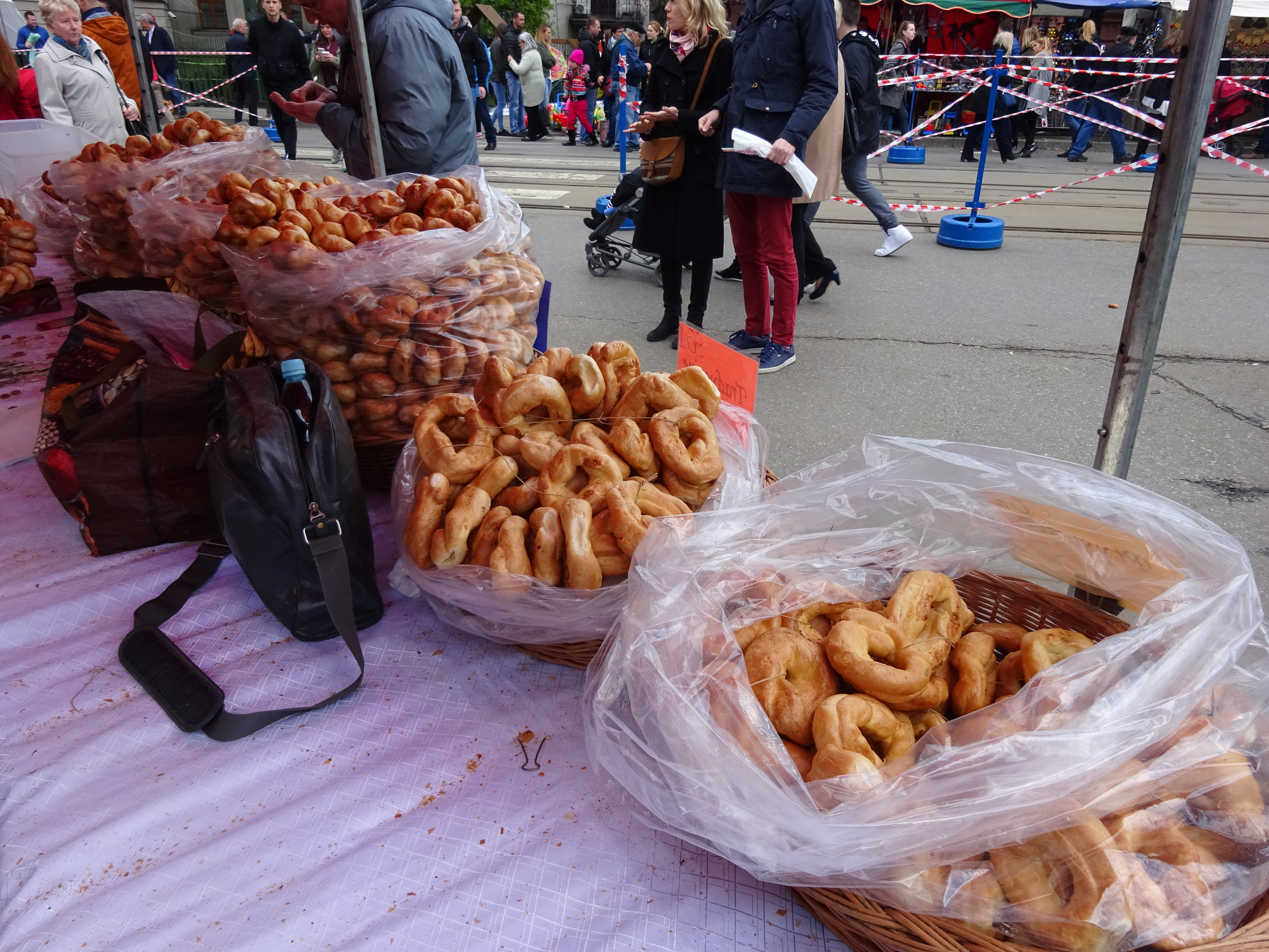 Tradycyjne precelki odpustowe na odpuście Emaus w Krakowie.